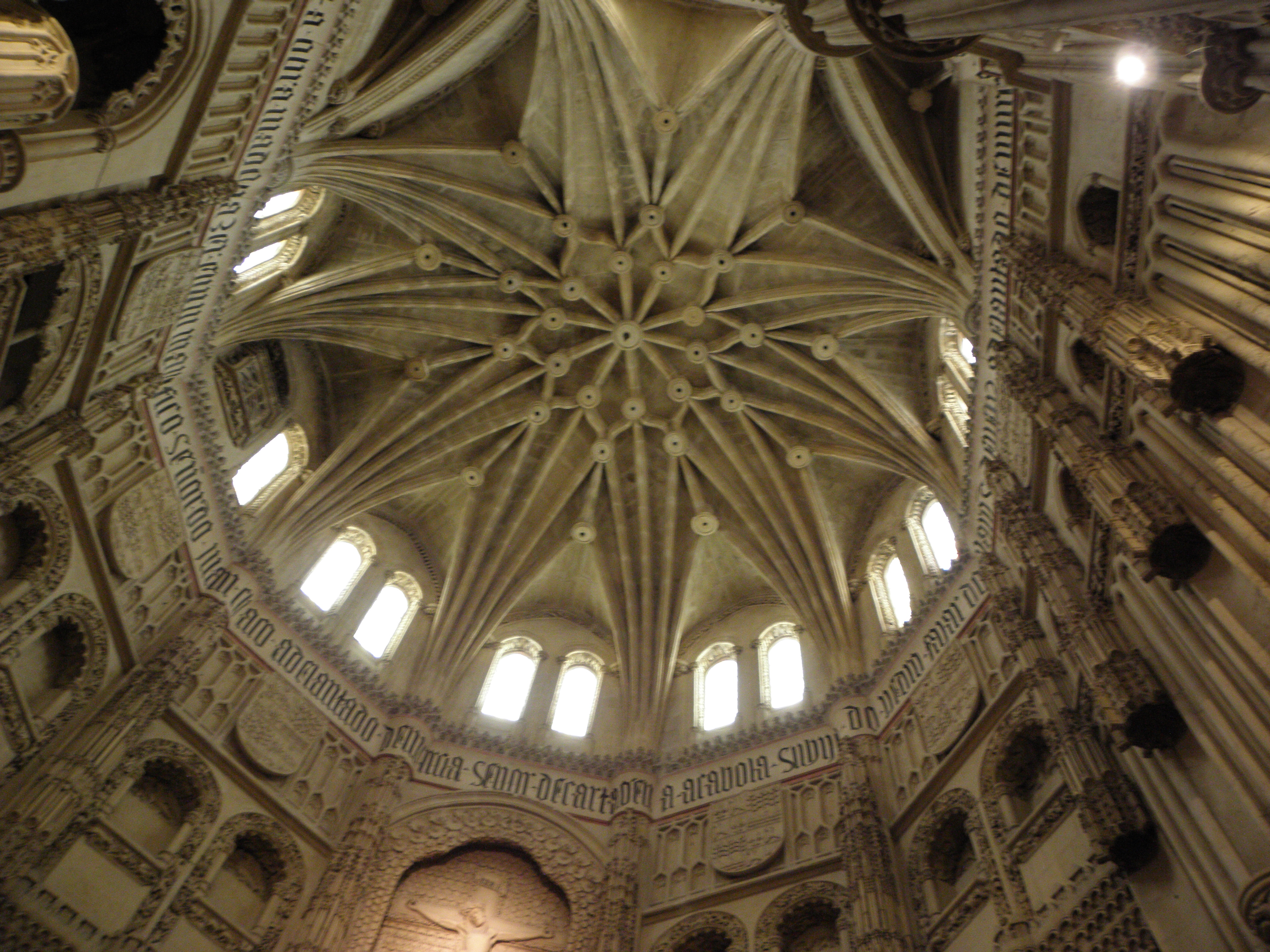 Esta foto participó en el juego En otro lugar de Flickr. CAPILLA DE LOS VELEZ Edificada en estilo gótico flamígero como lugar de enterramiento del Adelantado Mayor del Reino de Murcia; las obras se iniciaron en el 1490 por mandato del Adelantado D. Juan Chacón bajo el Episcopado de Rodrigo de Borja (1482-1492); que fue Papa posteriormente con el nombre de Alejandro VI. Esta capilla es un cuerpo adosado a la fábrica general que ocupaban dos antiguas capillas de la girola. Tiene planta poligonal y una cúpula estrellada de diez puntas. La construcción de esta capilla dio lugar a un gran pleito entre los Adelantados y el concejo al estrangular el trazado de la contigua calle Oliver, pleito que tuvo que ser resuelto por los Reyes Católicos. Está dedicada a San Lucas y se asemeja a la Capilla del Condestable de Burgos o a la de D. Álvaro de Luna en Toledo. Es de autor desconocido, aunque se atribuyó a Juan Guas o a Juan de León. La obra fue terminada en 1507, siendo Adelantado D. Pedro Fajardo, primer Marqués de Los Vélez (de ahí el nombre popular de la capilla). La simbología escultórica de la capilla denota el linaje y el poder adquirido por la familia Fajardo. Un ejemplo de ello es la cadena de piedra que rodea el perímetro exterior de la capilla y los relieves y esculturas con los escudos de la dinastía sostenidos por los denominados salvajes. Dado su alto valor artístico, en 1928 fue declarada Monumento Nacional.(Wiquipedia)